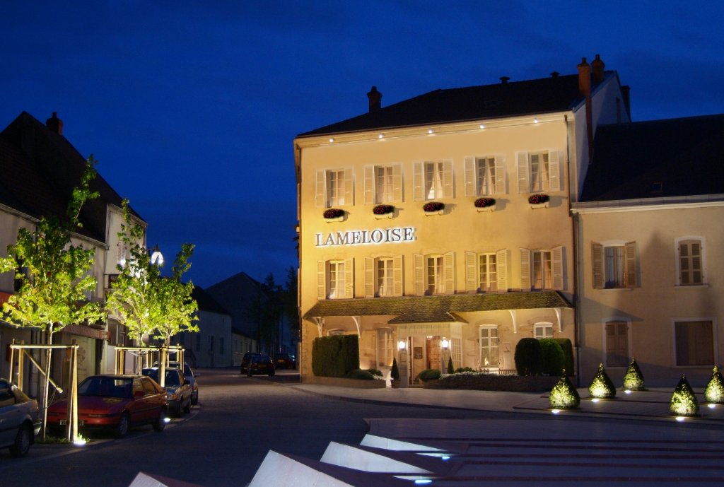 Restaurant Lameloise du chef Jacques Lameloise